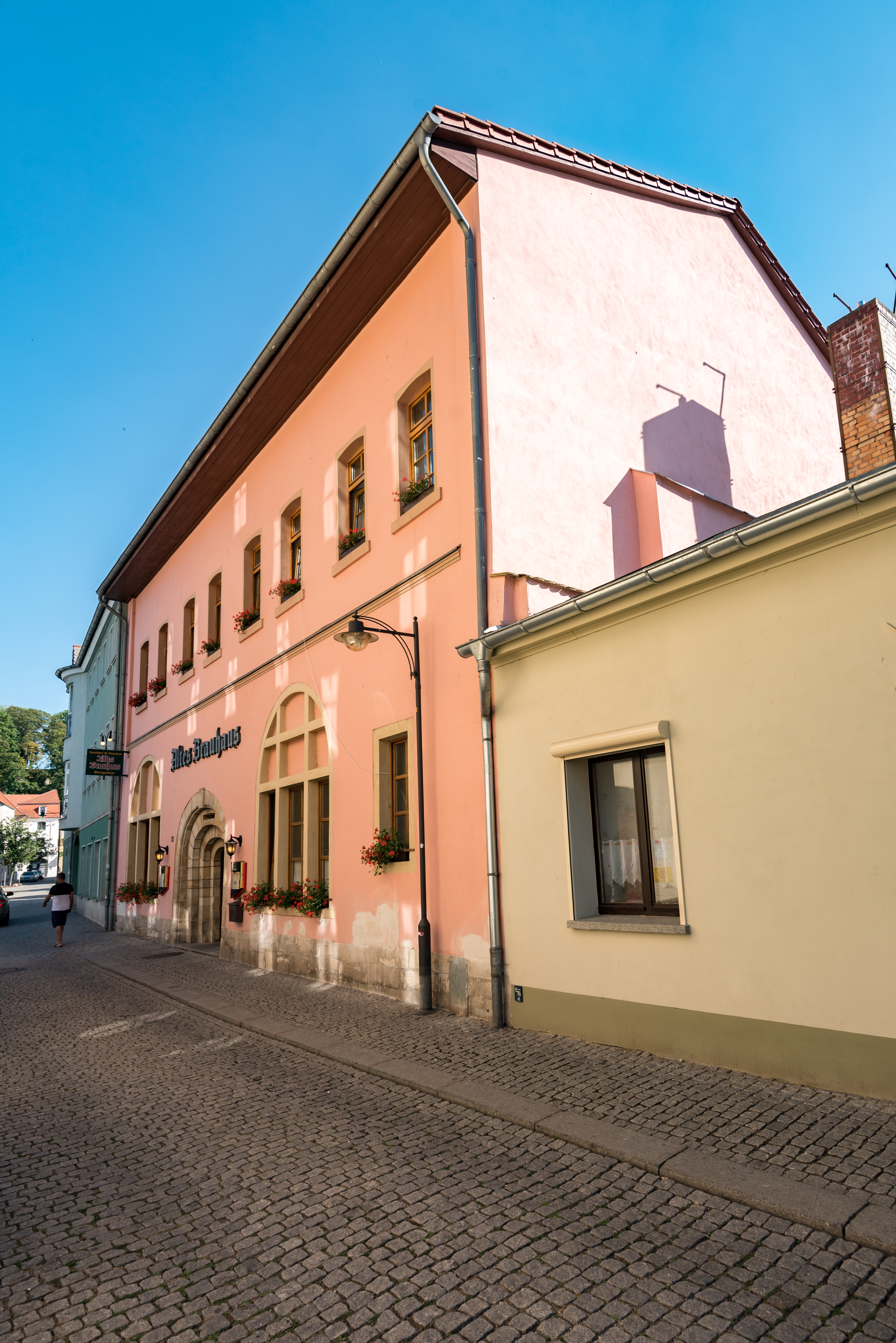 Weißenfels, Fischgasse 22